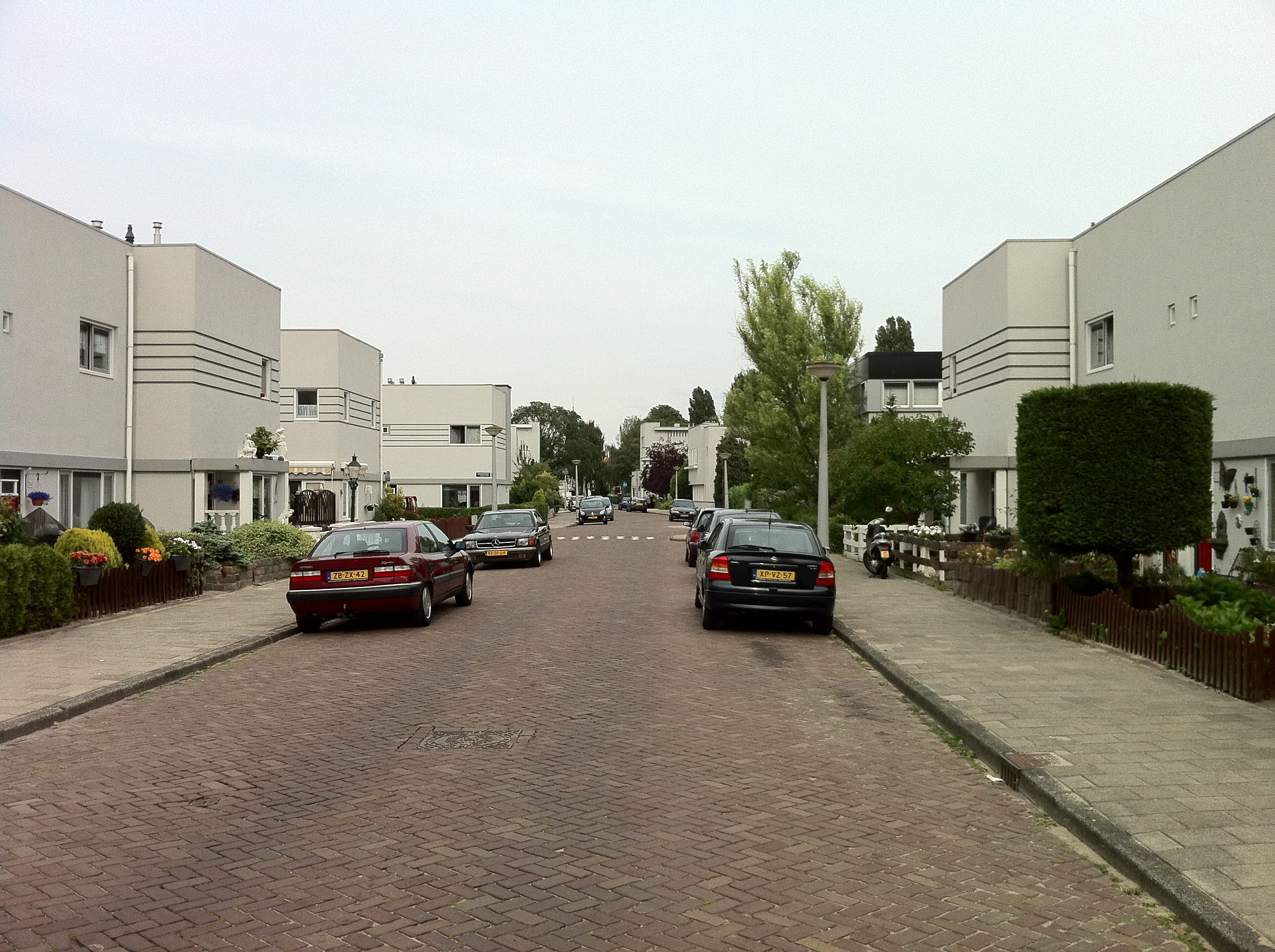 Veeteeltstraat Betondorp Amsterdam